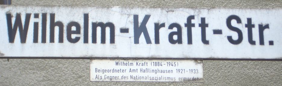 Straßenschild der Wilhelm-Kraft-Straße in Sprockhövel-Haßlinghausen, Ennepe-Ruhr-Kreis, Nordrhein-Westfalen, Deutschland